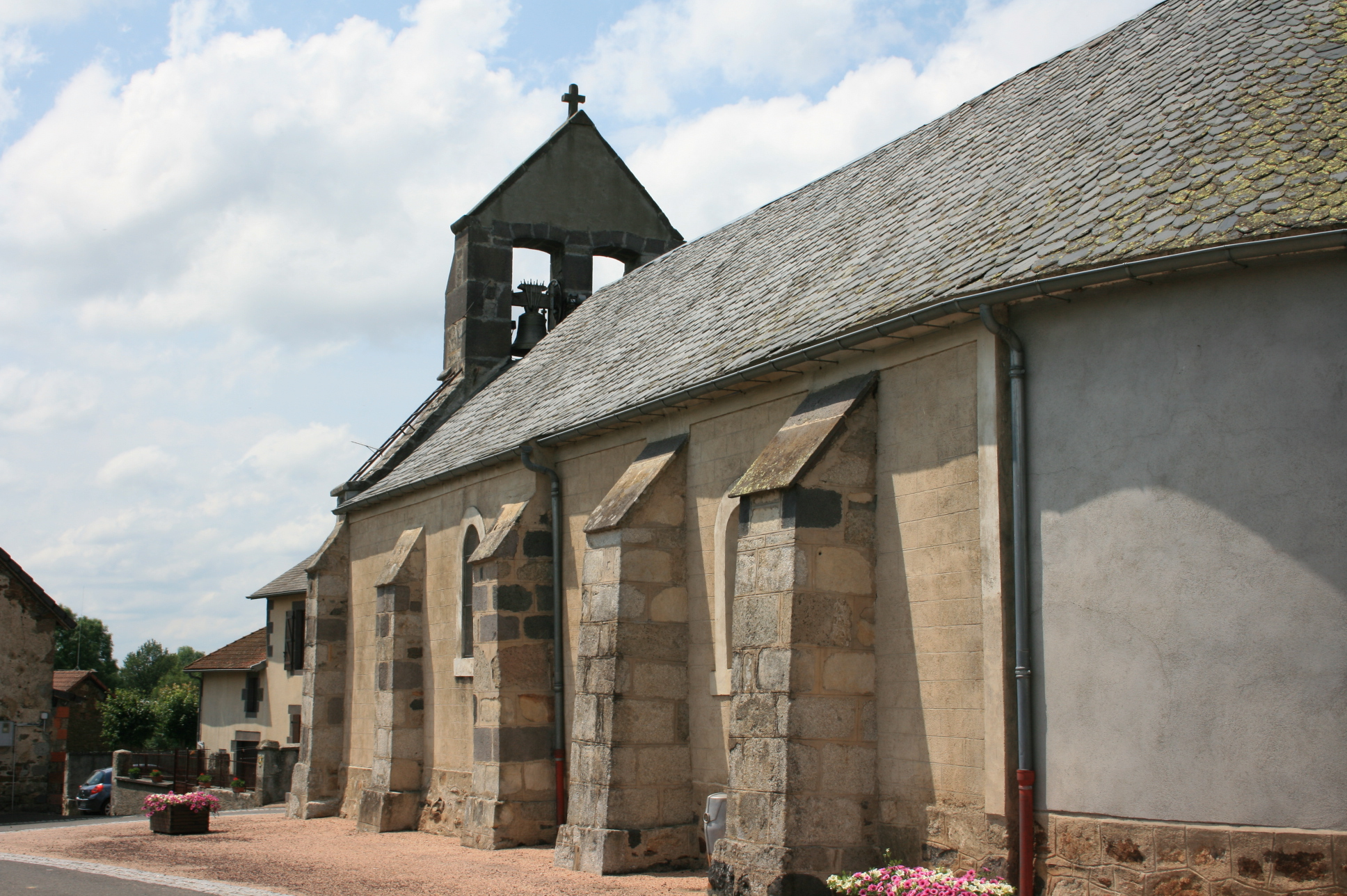 Eglise Sant-Hilaire-les-Monges 2